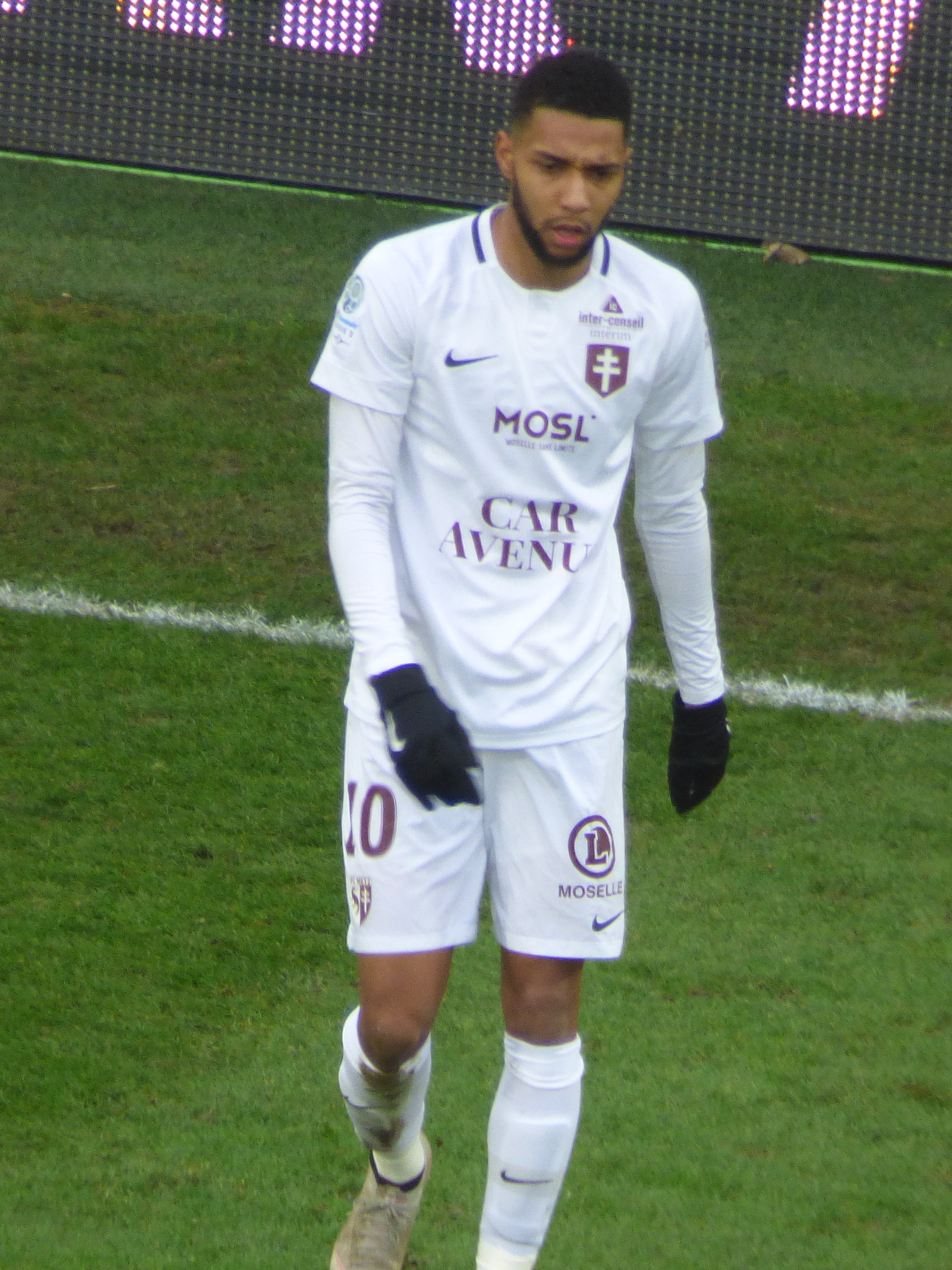 Marvin Gakpa pendant le match RC Lens / FC Metz, comptant pour la vingt-quatrième journée du championnat de France de Ligue 2 2018-2019, le 9 février 2019, au Stade Bollaert-Delelis.